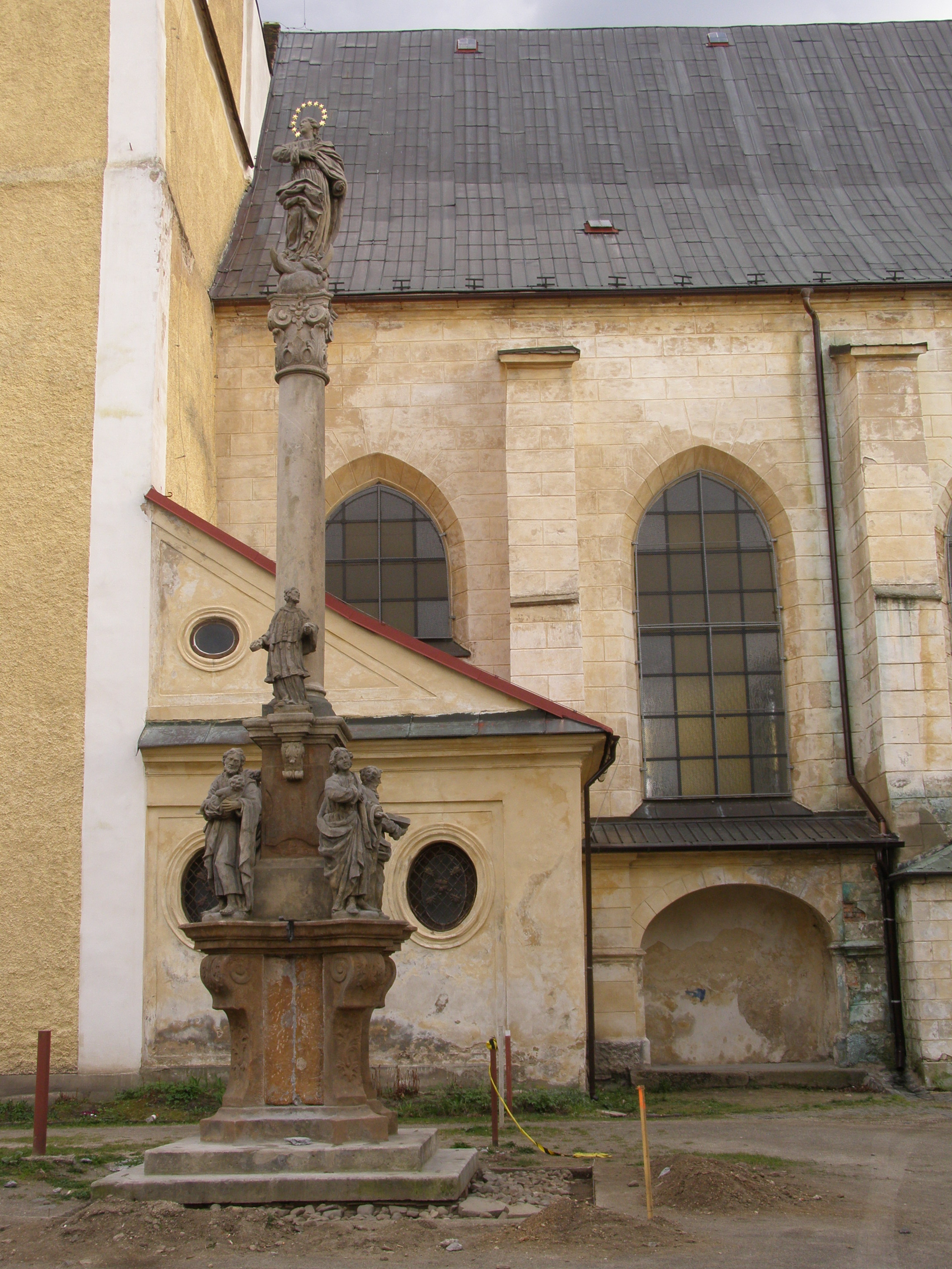 Česky: Frýdlant, mariánský sloup u Kostela nalezení svatého kříže)